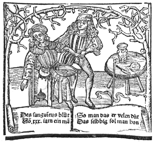 Abbildung eines Aderlass